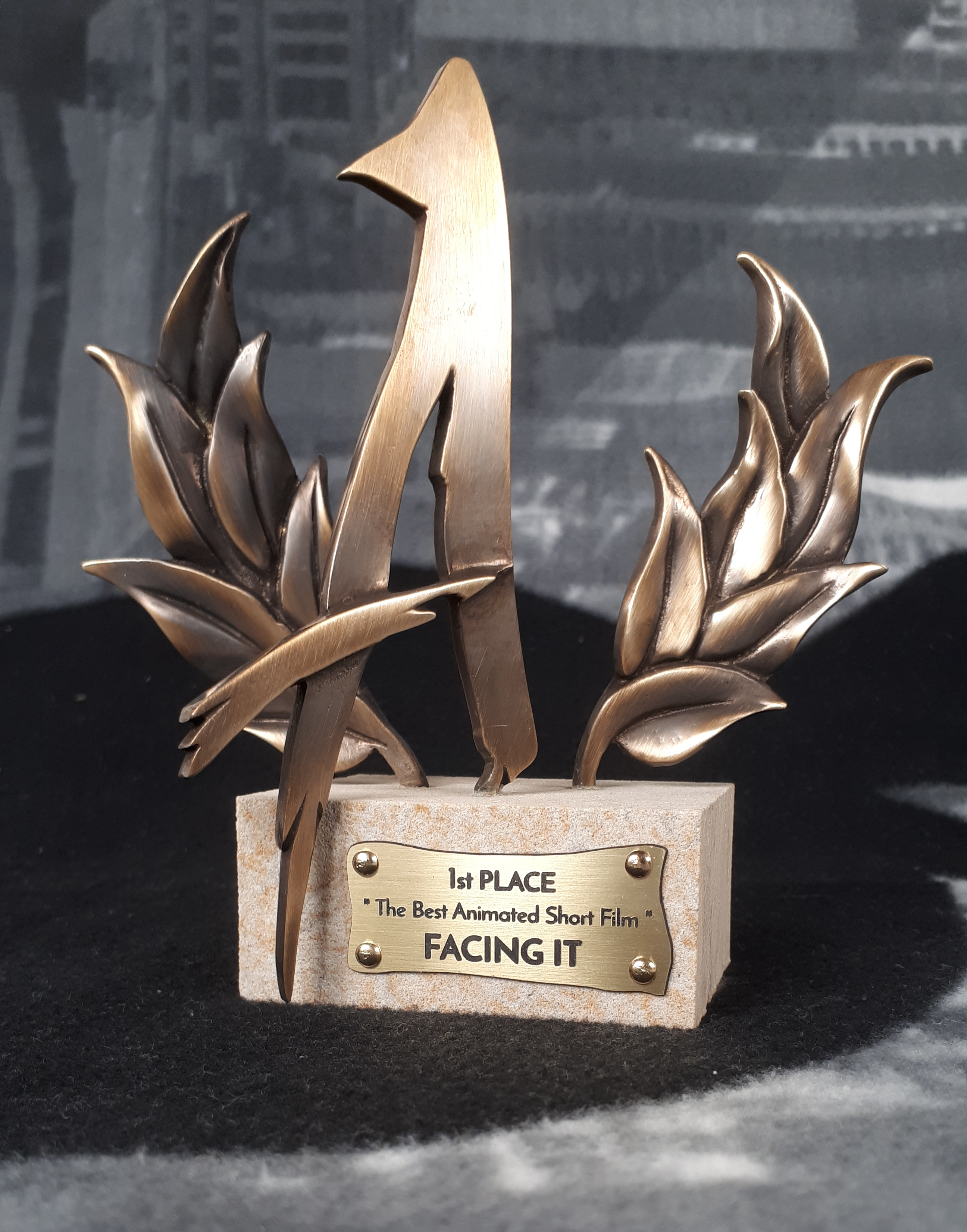 Trofej festivalu Anishort pro vítězný krátký animovaný film 5.ročníku